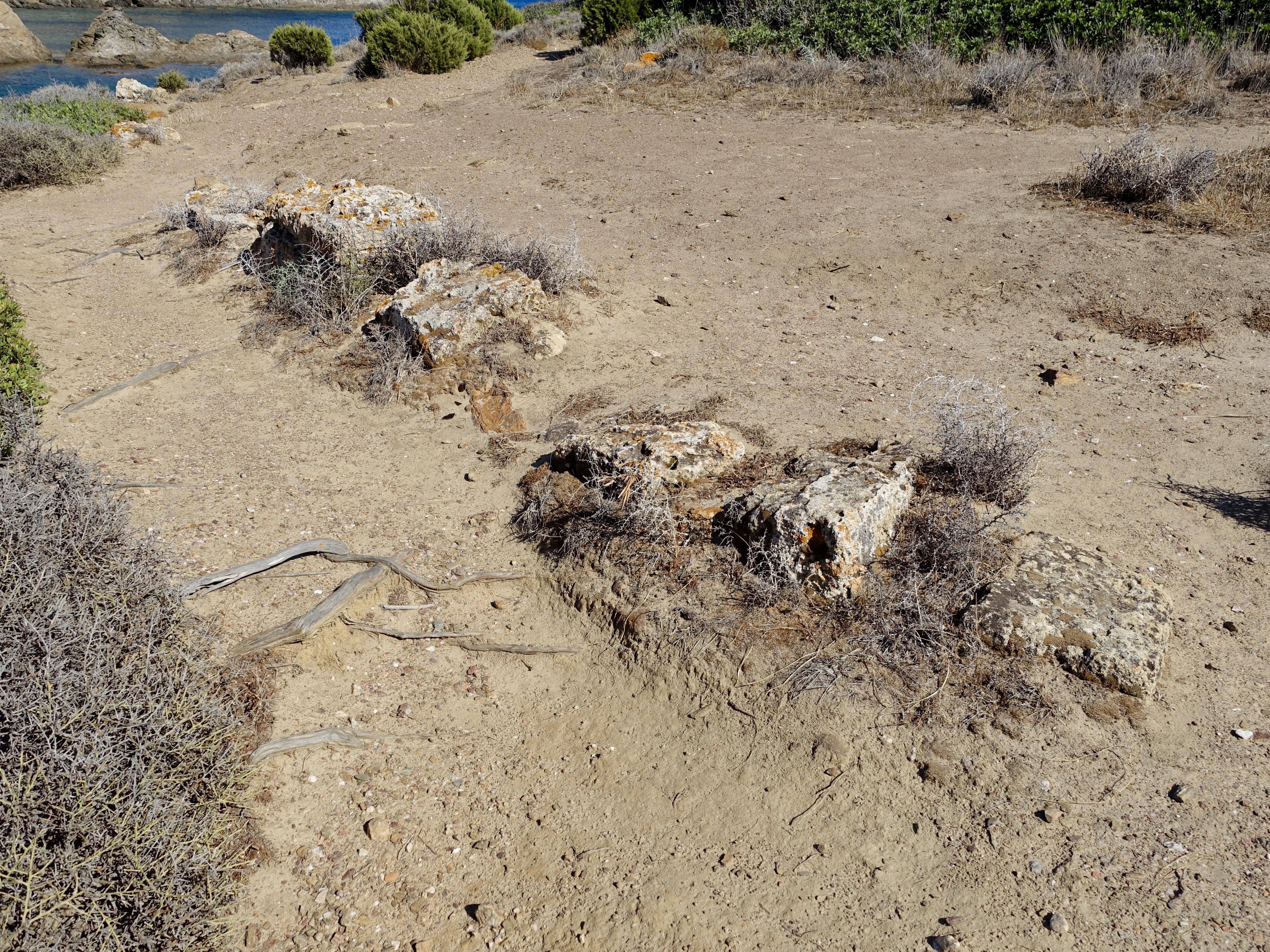 Insel Su Cardolinu (Isola Su Cardolinu), Gemeinde Domus de Maria, Sardinien, Italien